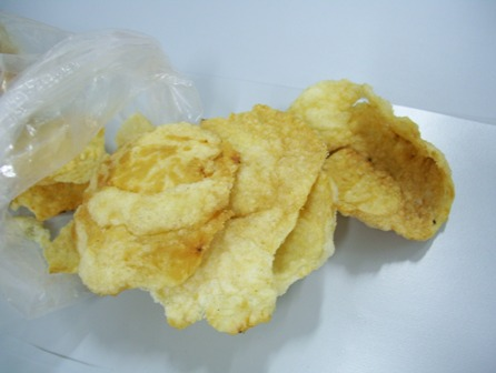 kerupuk emping